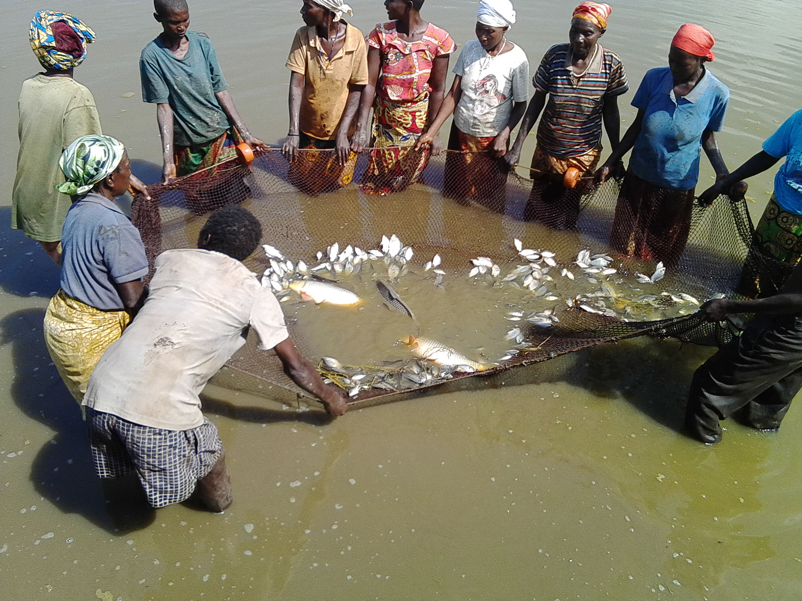 Récolte du poisson au Burundi (Kirundo) This is an image of "African people at work" from Burundi